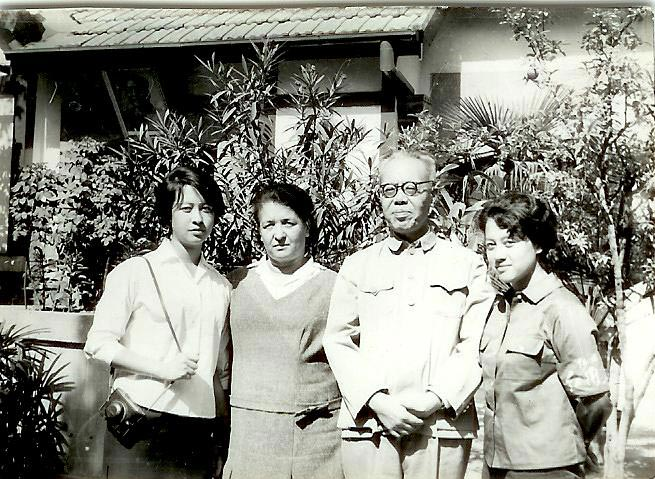 Последняя фотография Ли Лисаня с семьёй. Слева направо: дочь Алла, жена Елизавета, Ли Лисань, дочь Инна